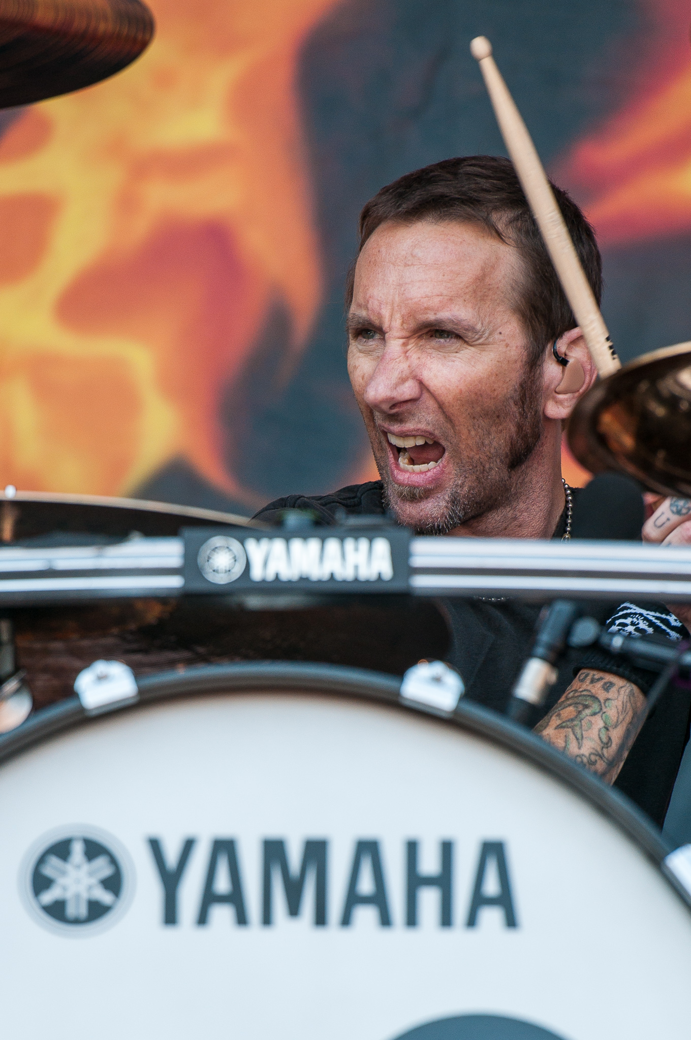 ARGO-Konzerte,Beck's Park Stage,Festival,Godsmack,James Shannon Larkin,Konzert,Livekonzert,Livemusik,Musik,RiP,Rock im Park 2015,Shannon Larkin